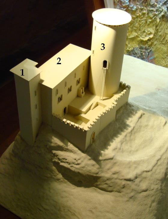 Maqueta del Castell de Castellet